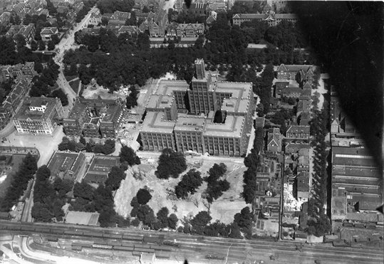 Luchtfoto te Utrecht van De Inktpot (HGB III) uit 1921-1922 met goed zichtbaar de carrévorm van het gebouw en de binnentuin. Links ervan respectievelijk Hoofdgebouw II (ca. 1895) en I (ca. 1870). Alle drie zijn het rijksmonumentale kantoorgebouwen die vanouds door spoorwegondernemingen worden gebruikt.